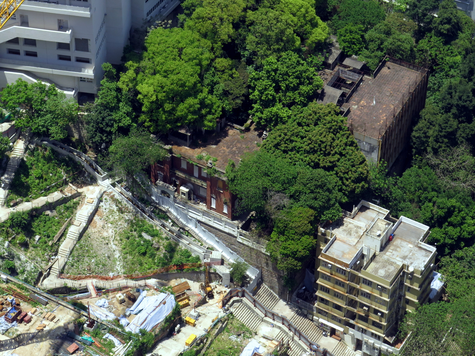 HNam Koo Terrace